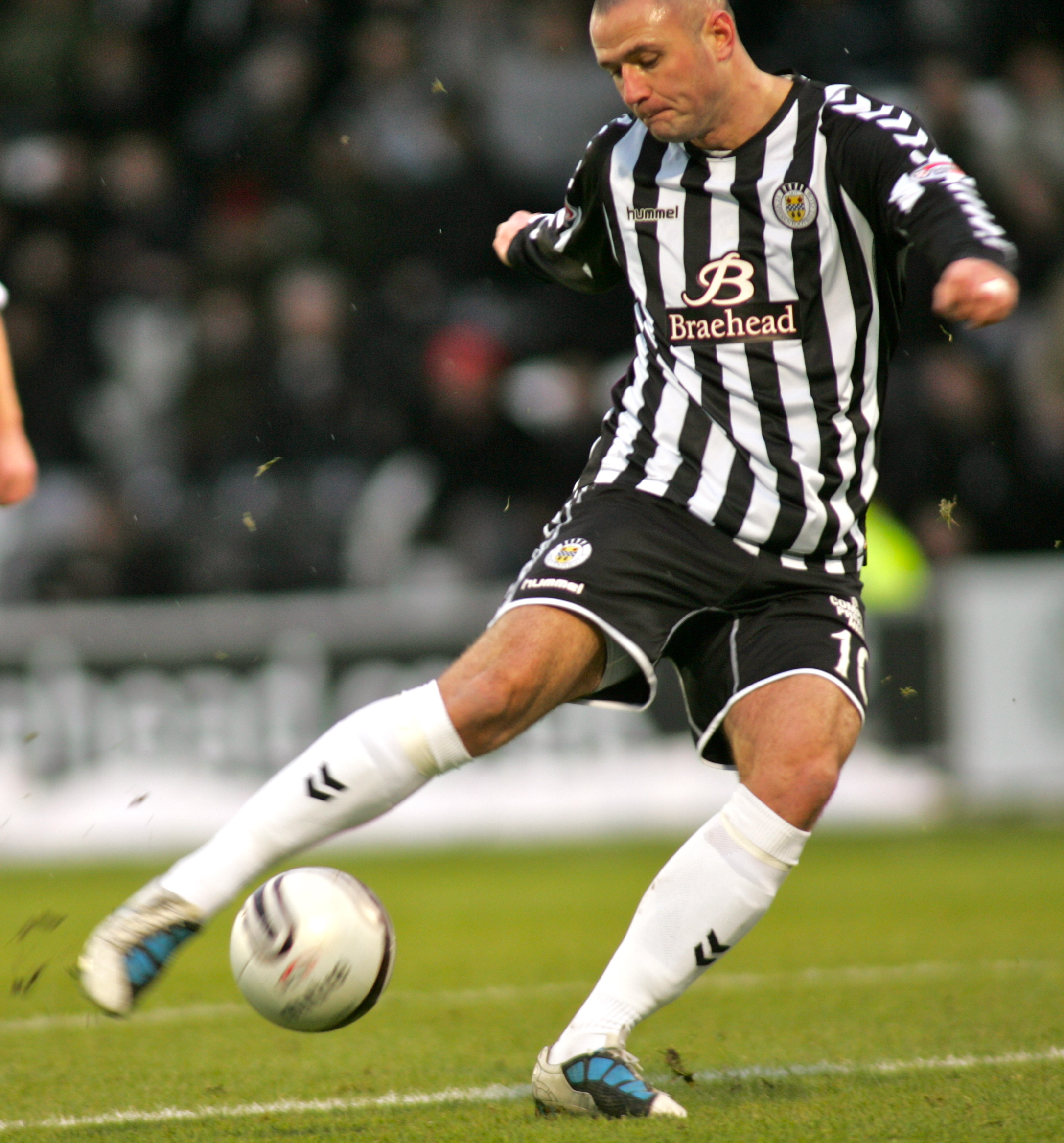 St Mirren vs Peterhead